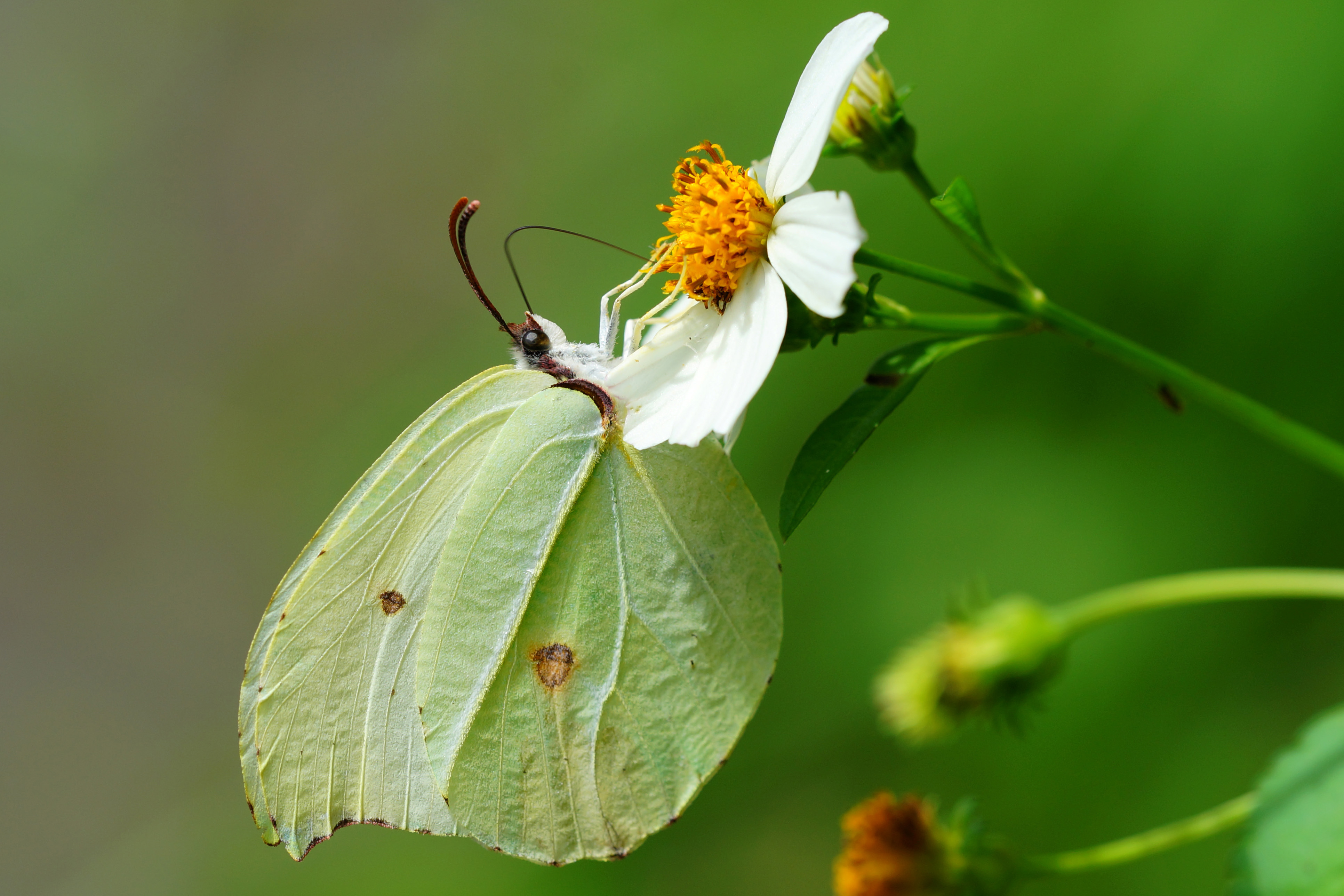 圓翅鉤粉蝶 Gonepteryx amintha formosana